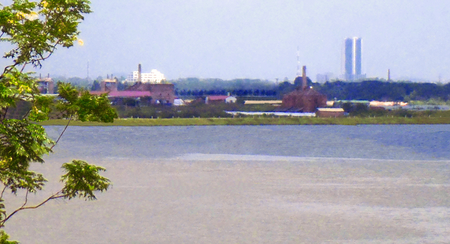 Sông Tích